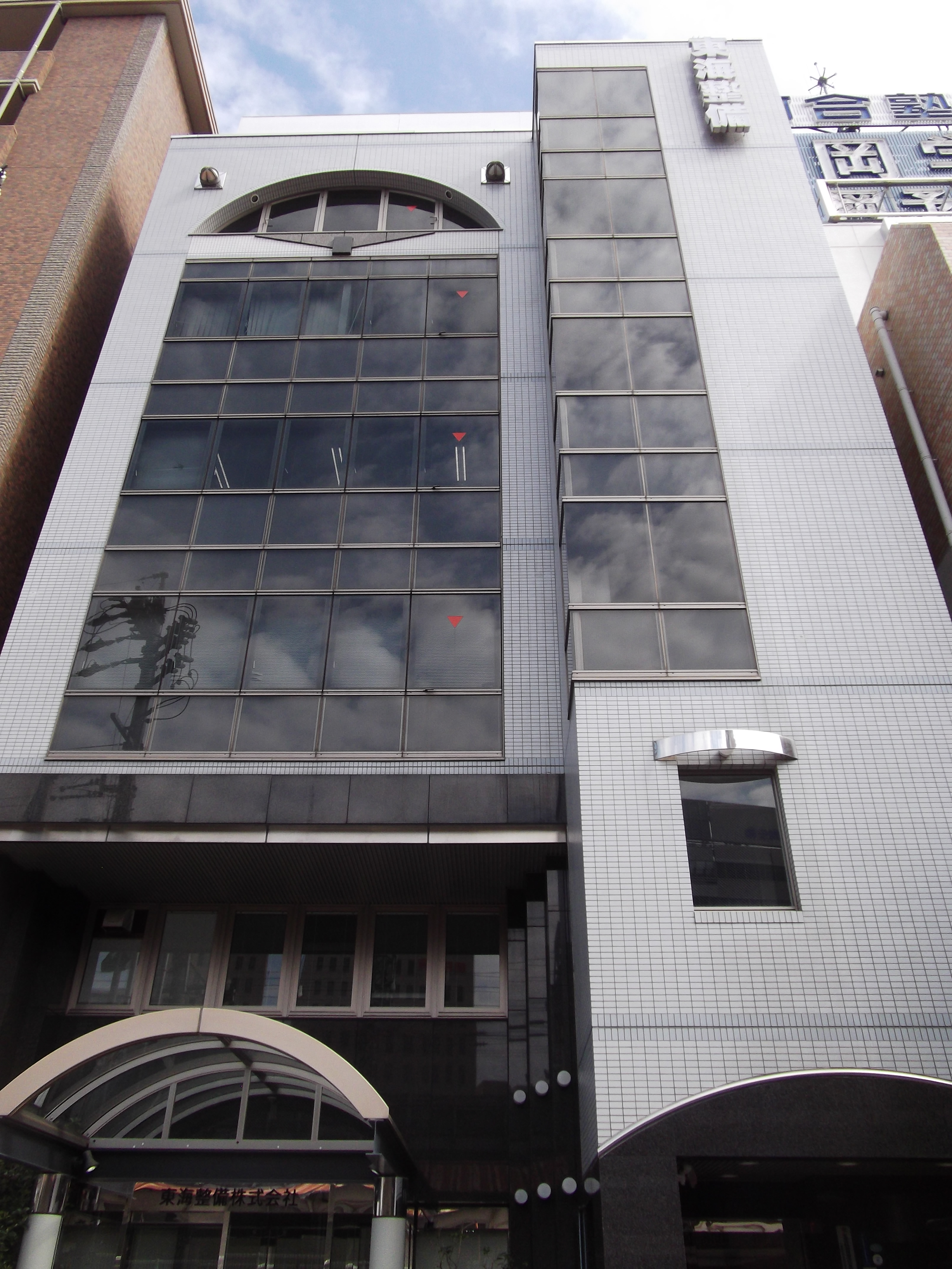 東海整備の本社ビル。